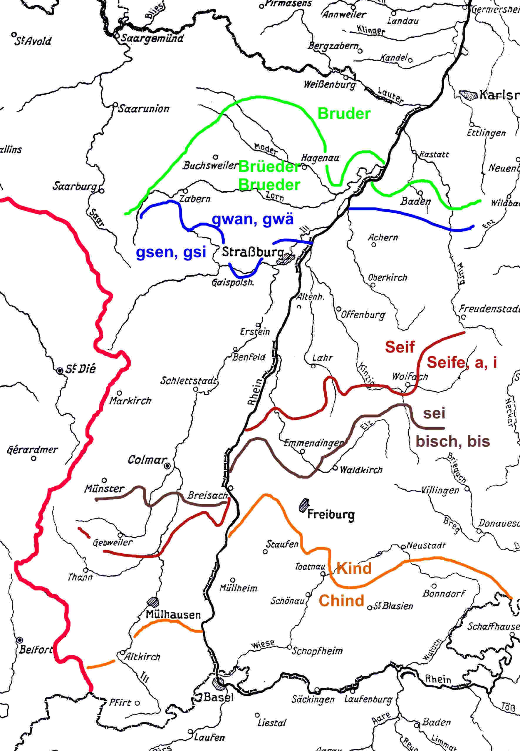 Schwimmende Sprachgrenzen des Elsässerditsch anhand bestimmter Begriffe sälwer gmacht